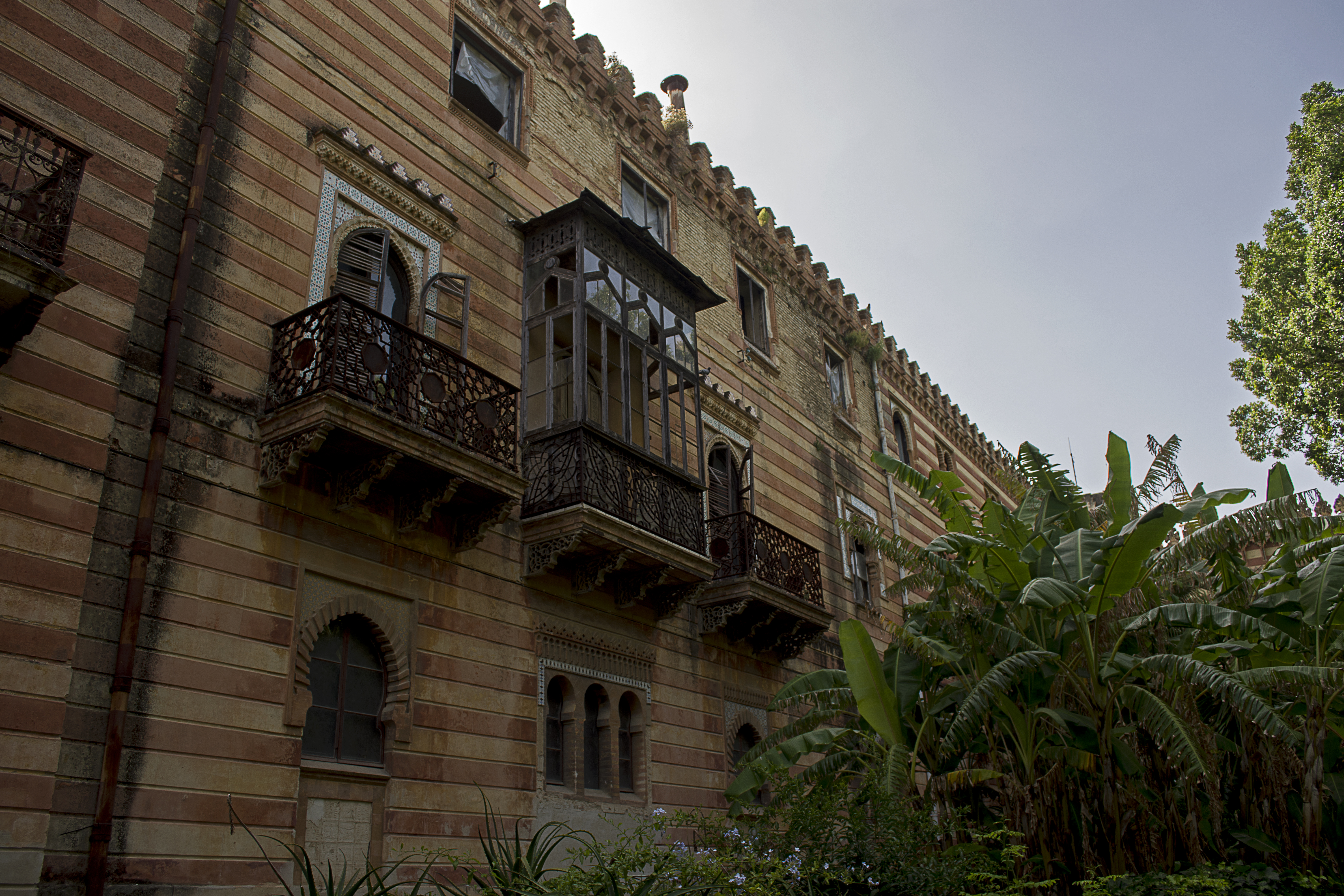 Palacio de Orléans y Borbón (Sanlúcar de Barrameda).